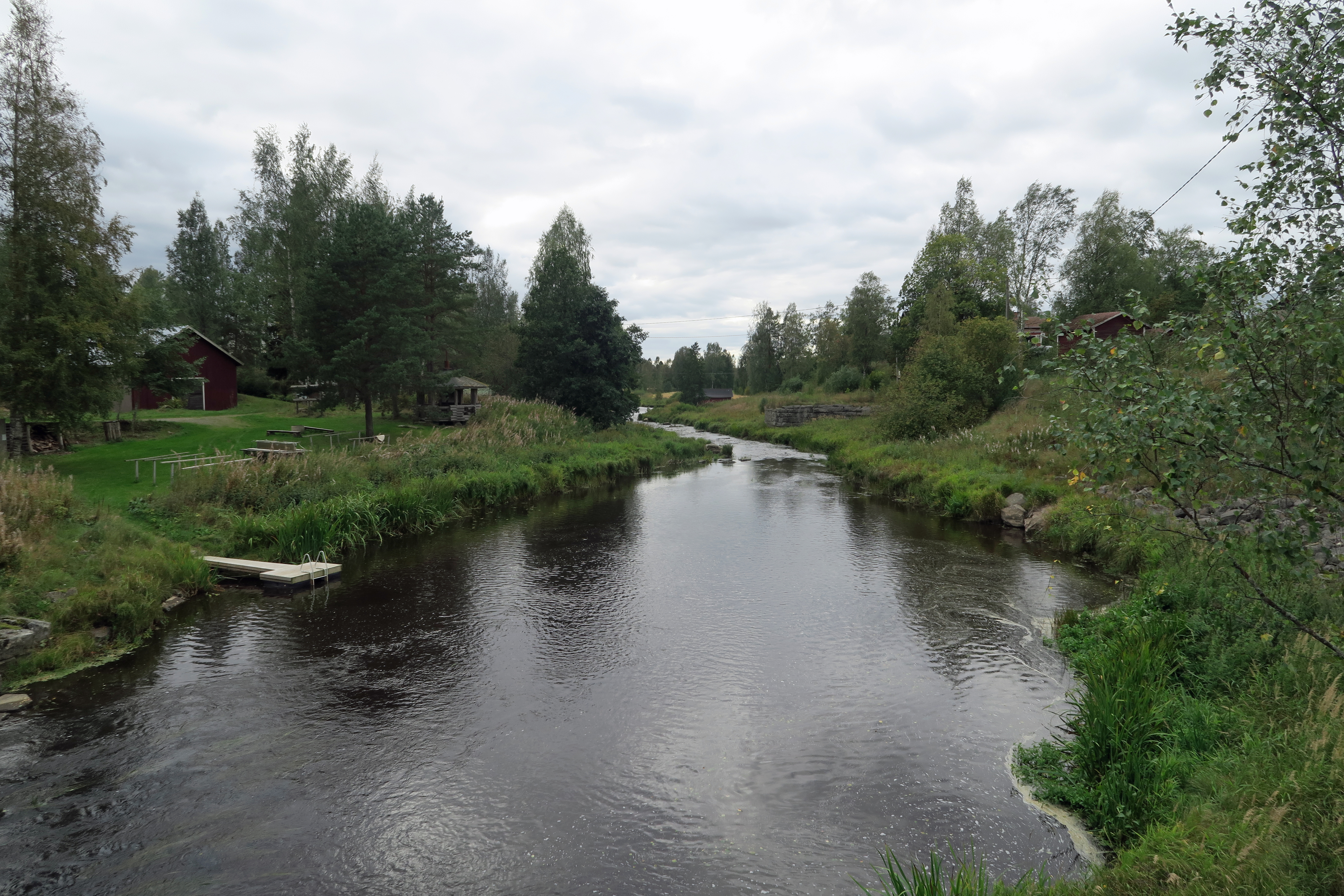 Lassilanjokea Noormarkun Lassilassa Porissa elokuussa 2016